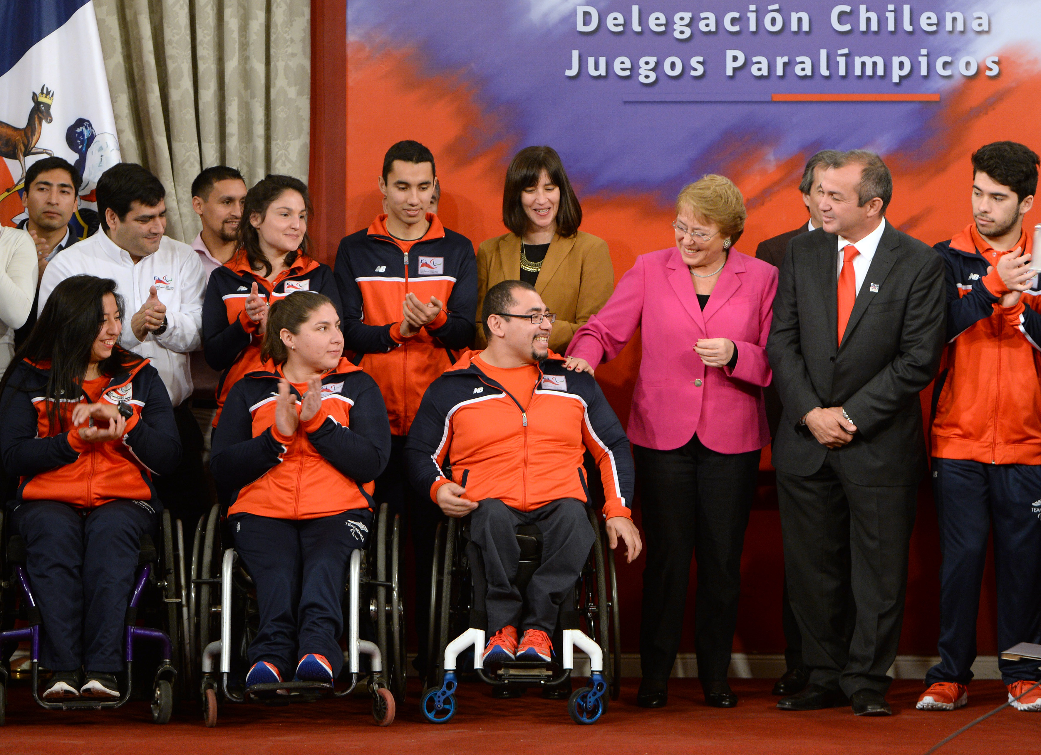 Gobierno de Chile